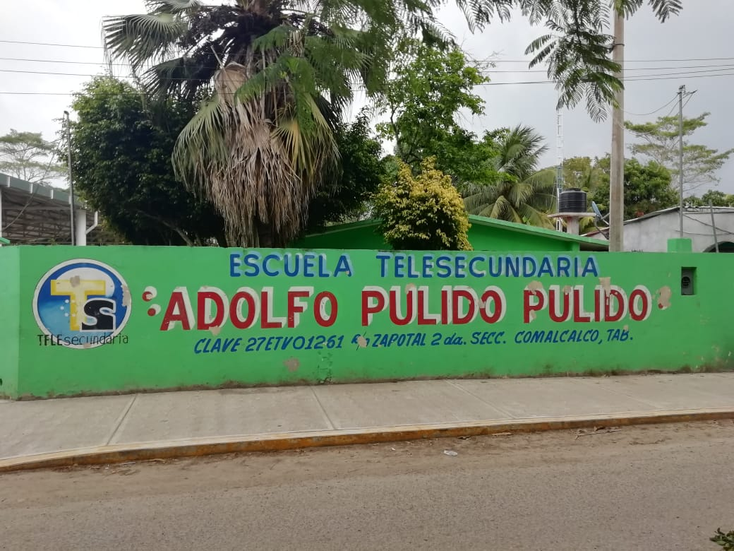 Telesecundaria que se ubica cerca del centro de reunión comunitario